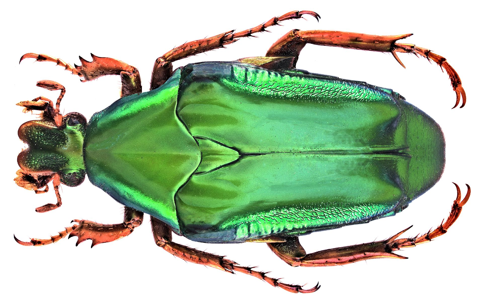 Familie: Scarabaeidae Groesse: 21,5-24,6 mm Fundort: Indonesien, Java, Bondowoso, 1932 det. U.Schmidt Photo: U.Schmidt, 2006